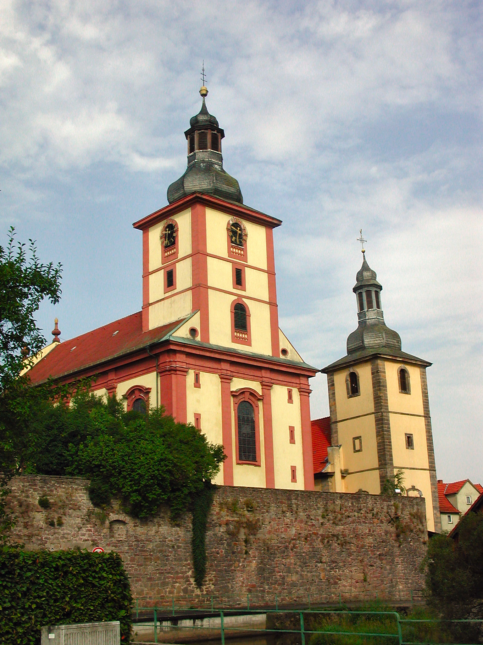 Kirchspiel zu Burghaun. Rechts ist die jüngere evangelische Kirche, links die auf der Ruine des alten Stadtschlosses erbaute ältere katholische Kirche zu sehen.